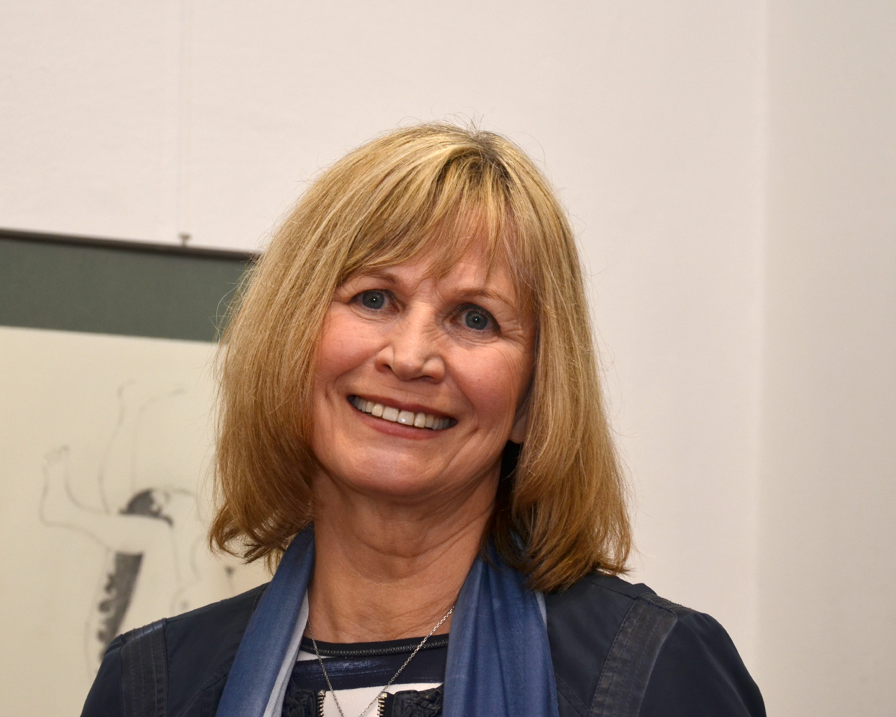 Jitka Molavcová (2016)